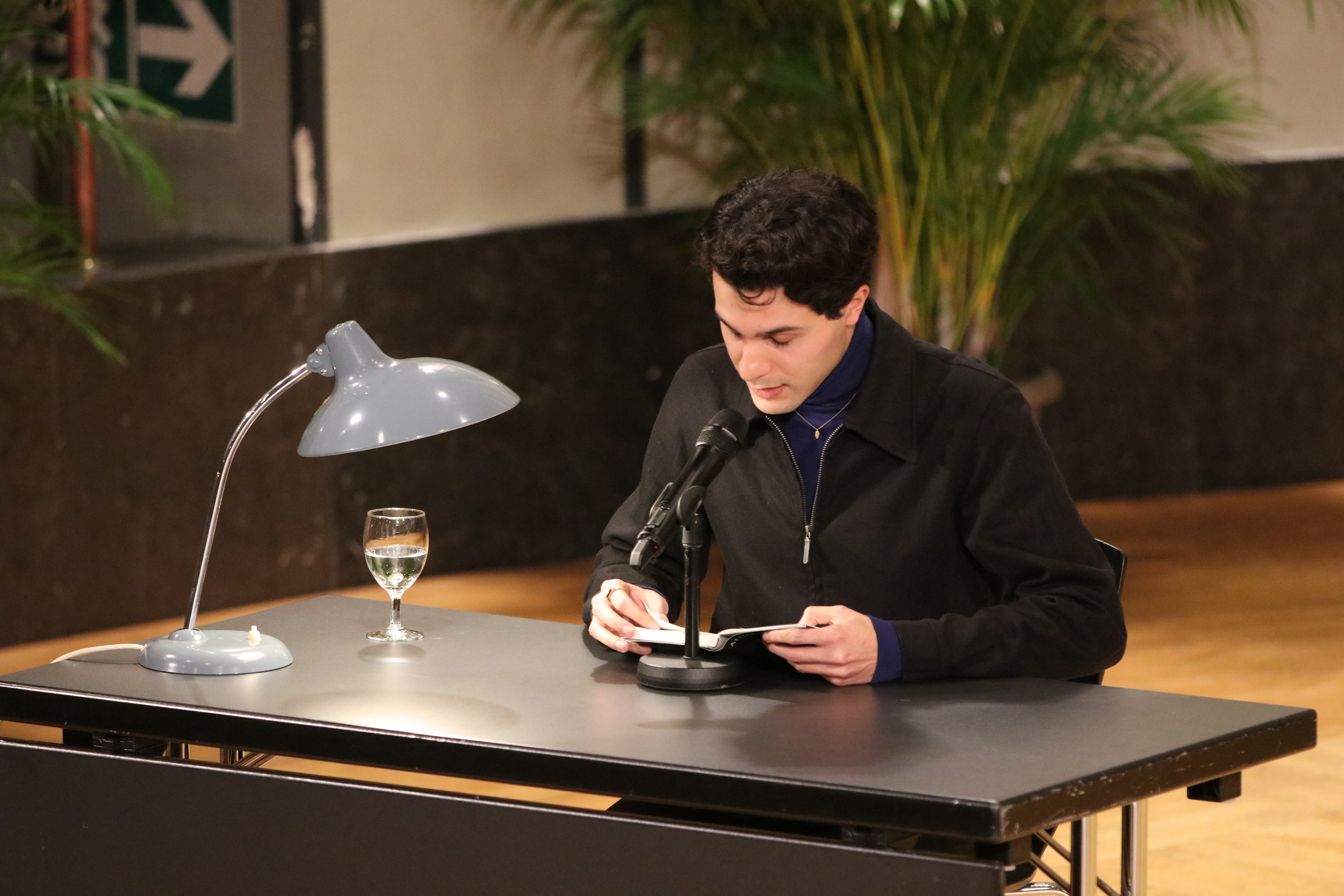 Der Schauspieler Benjamin Radjaipour liest beim Geschwister-Scholl-Preis 2019 Auszüge aus dem Buch "Ich werde die Welt nie wiedersehen. Texte aus dem Gefängnis", für das Ahmet Altan der Geschwister-Scholl-Preis zugesprochen bekommen hat.